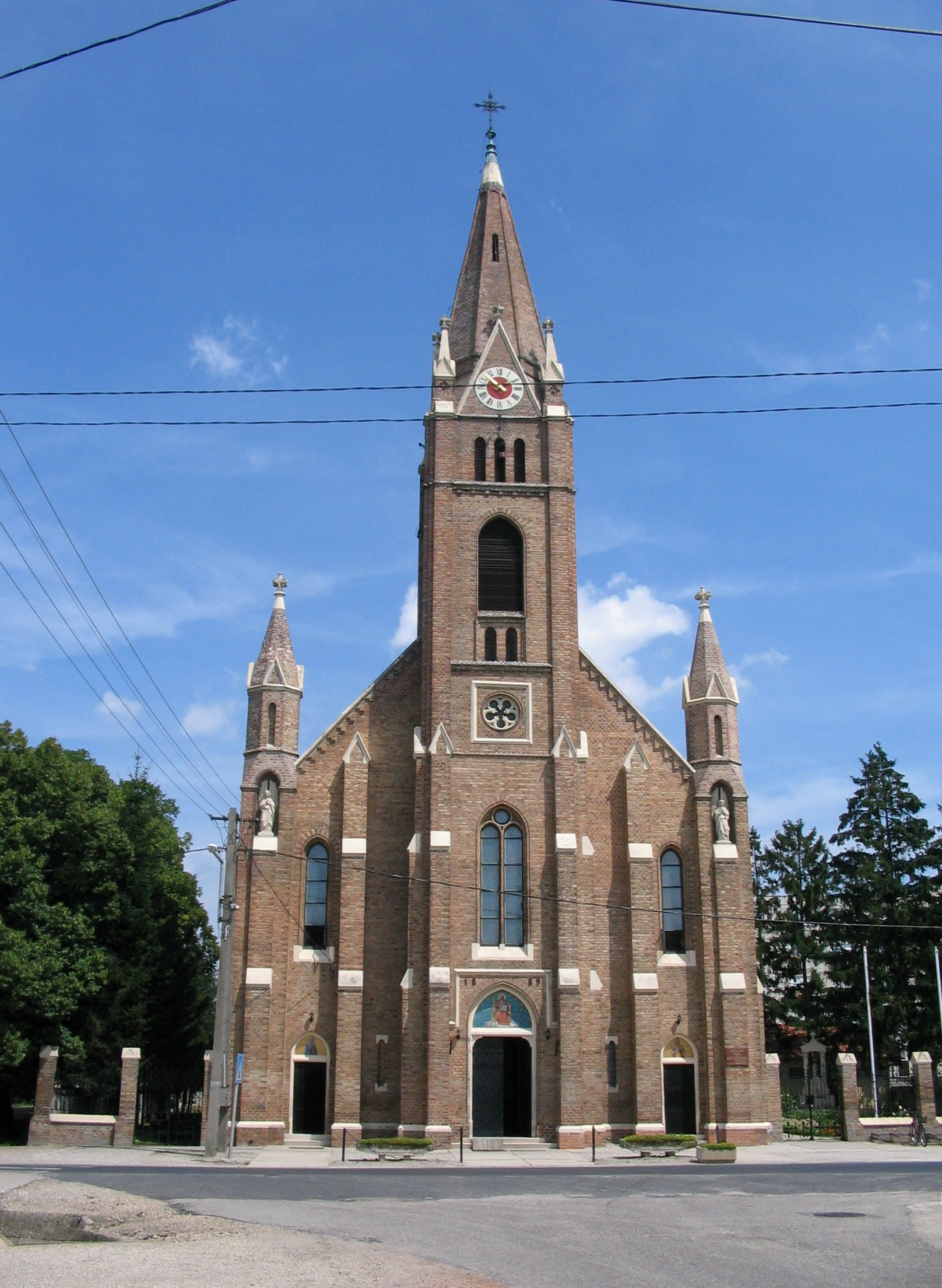 Szent András apostol római katolikus templom Fertődön